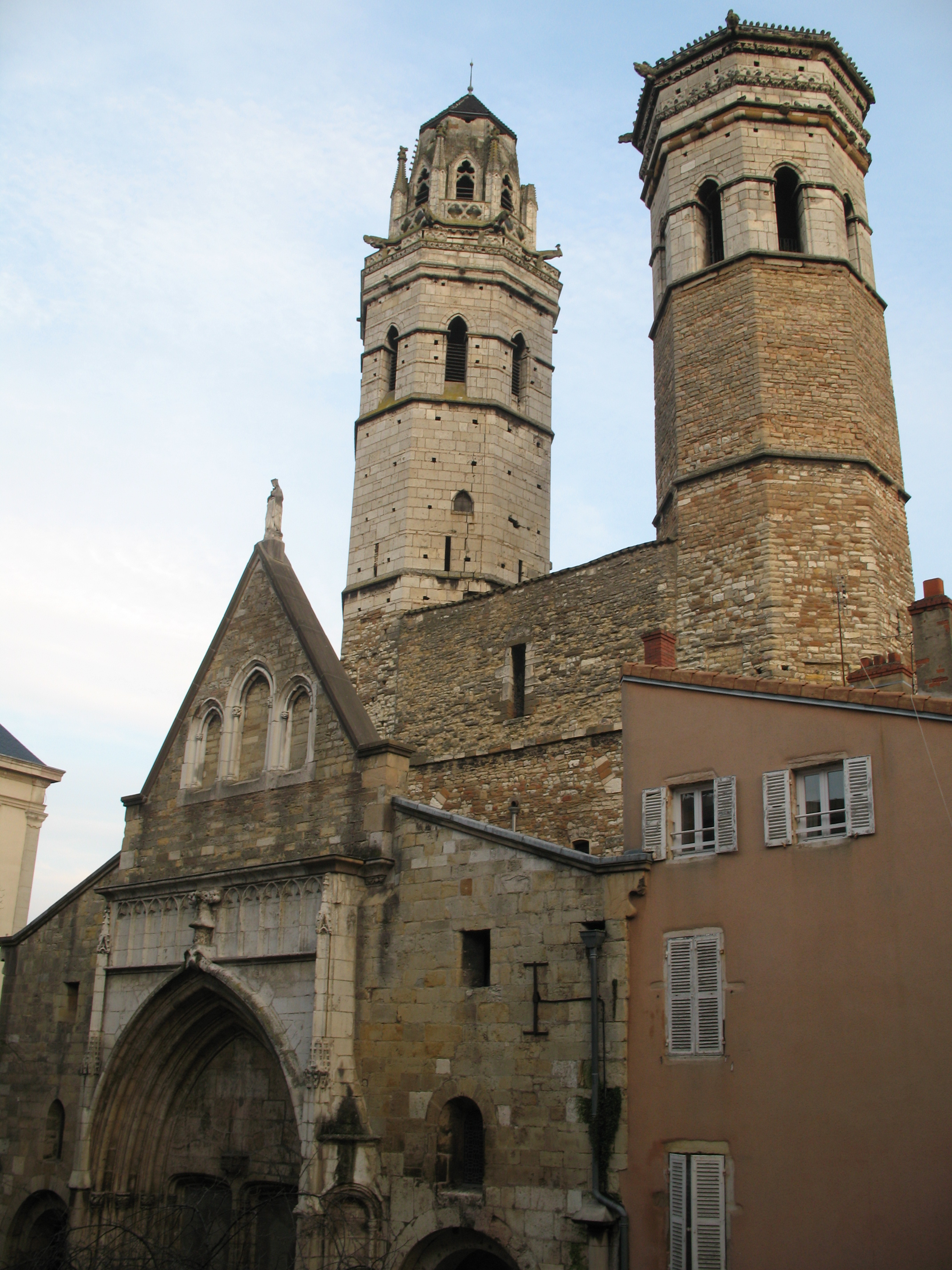 cathédrale du Vieux Saint-Vincent - Mâcon (Saône-et-Loire)